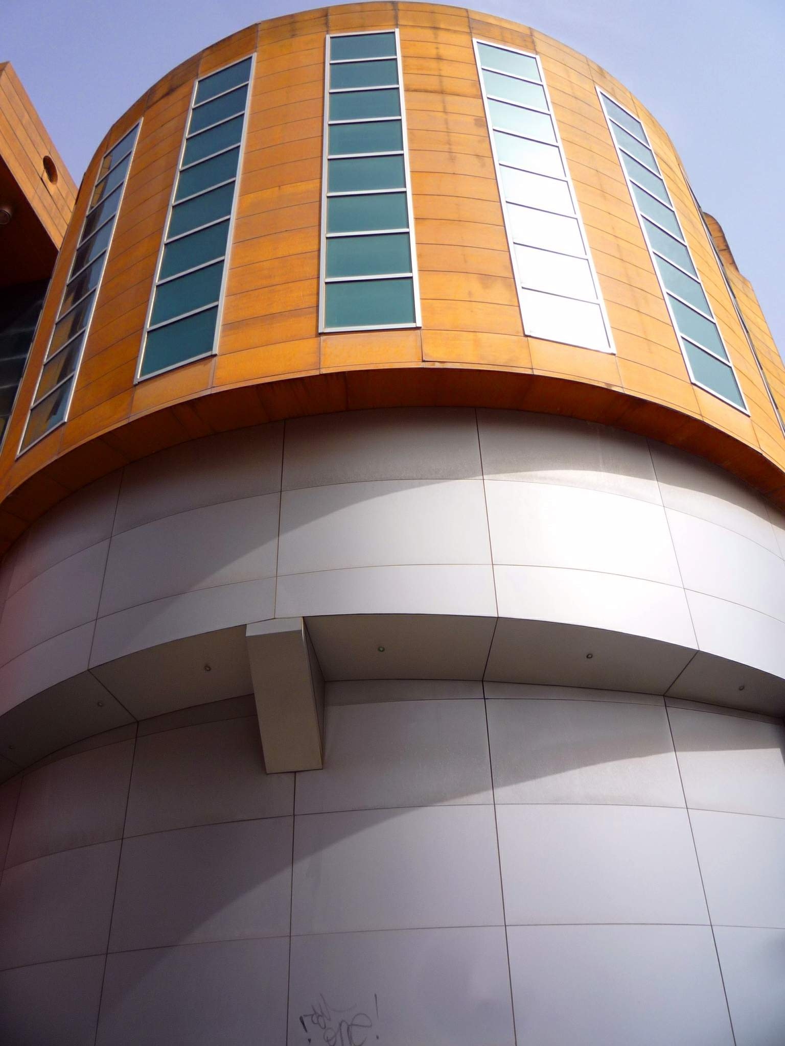 Torrevieja (Alicante) - Conservatorio Francisco Casanovas y Palacio de la Música